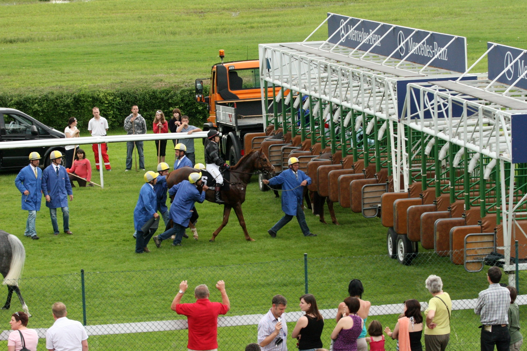 Befüllen der Startbox beim Iffezheimer Pferderennen.